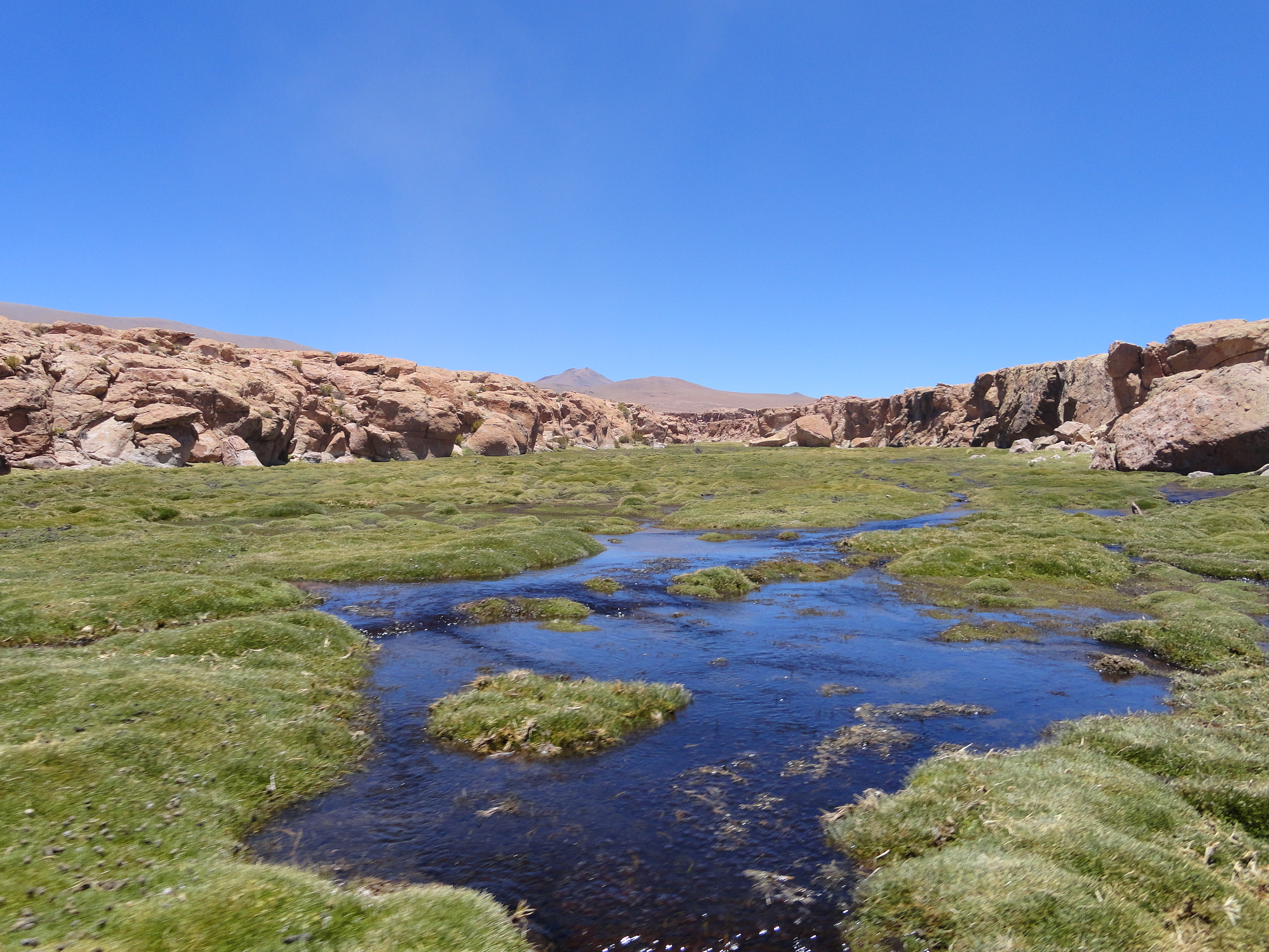 Bofedal en la zona sur del Altiplano boliviano